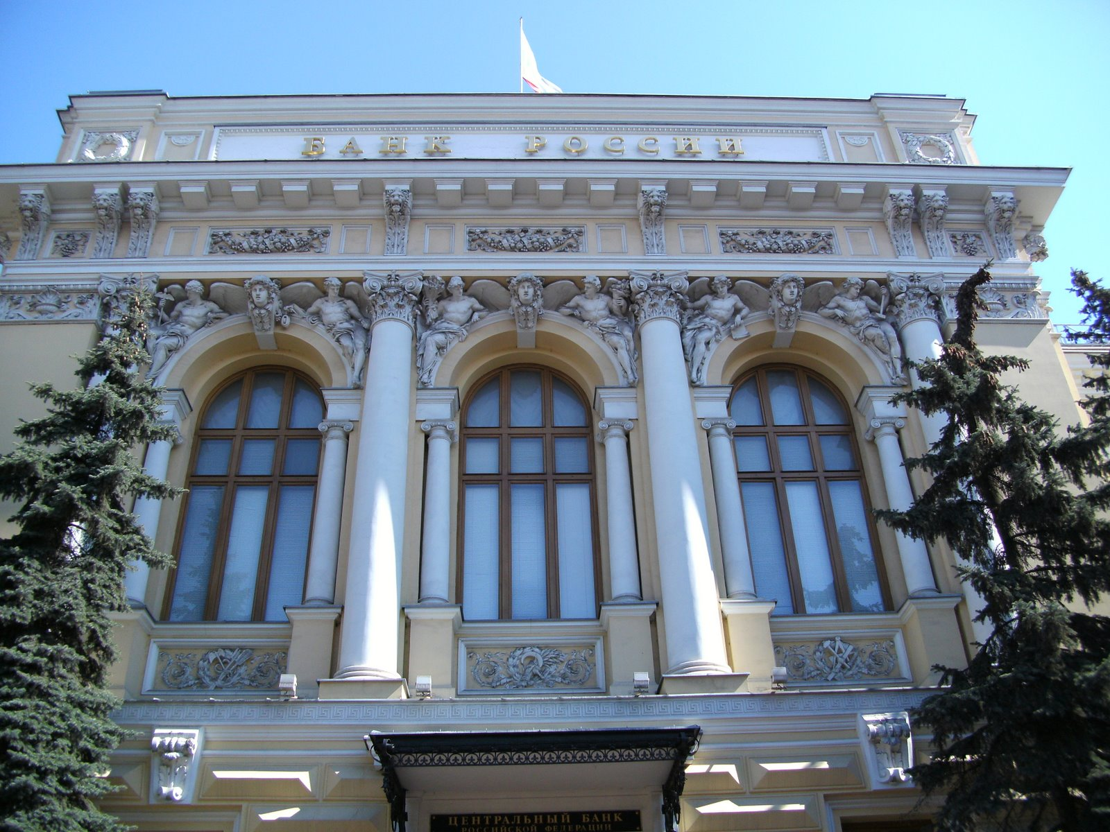 Банк России